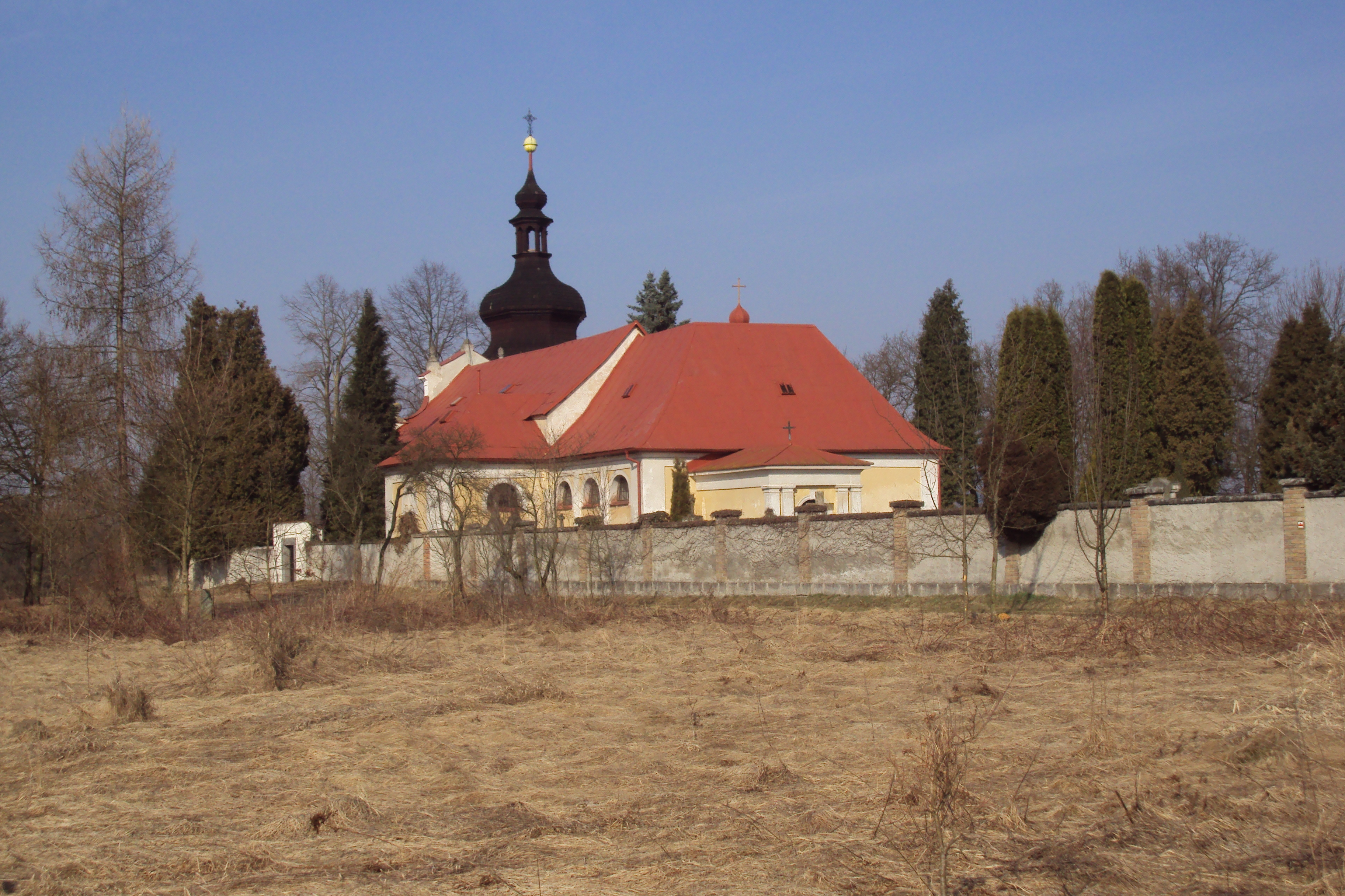 Kostel svaté Barbory u Zahrádek na Českolipsku